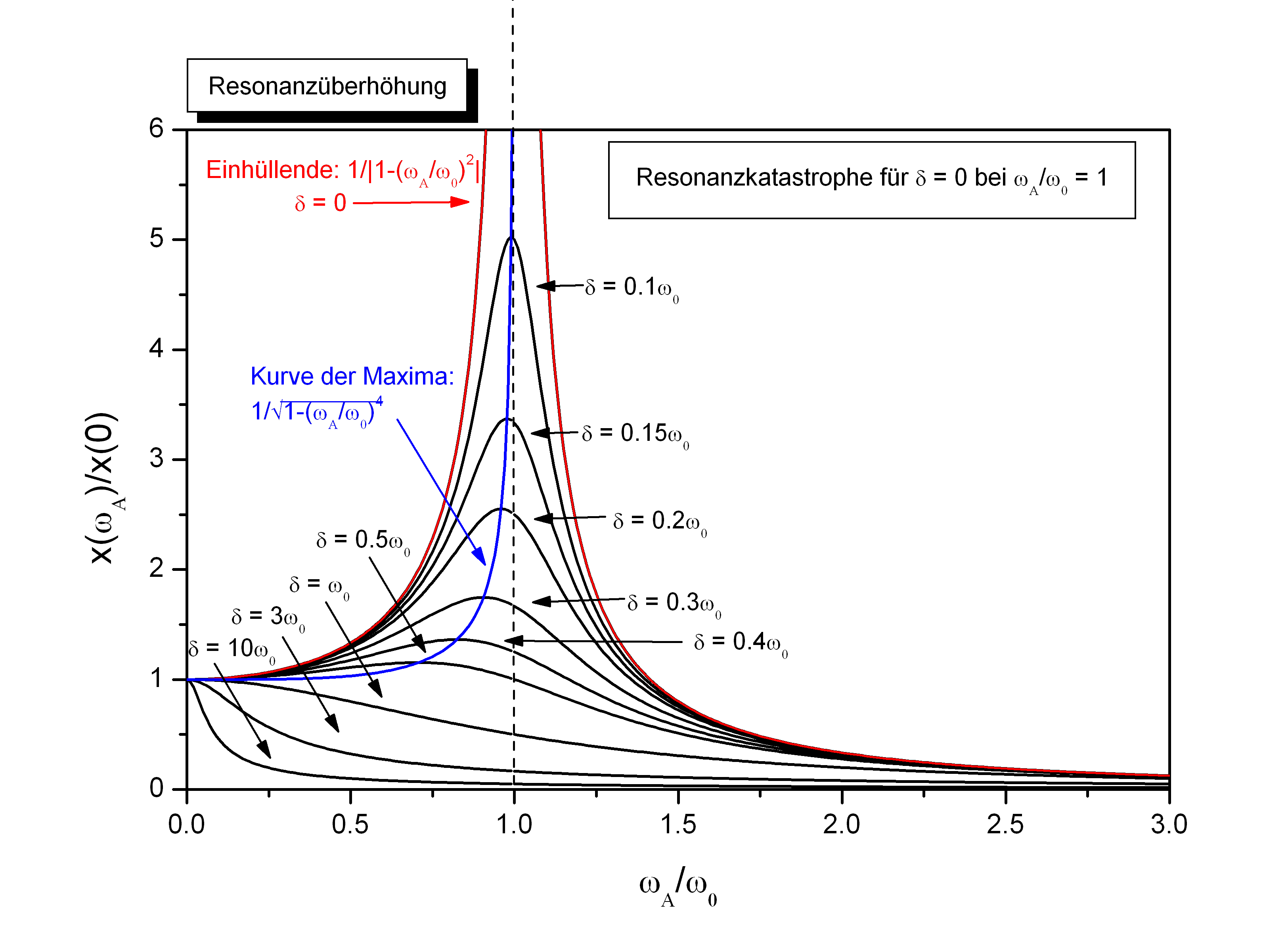 Resonanzkurve, Abhängigkeit der Amplitude von der Erregerfrequenz und der Dämpfung